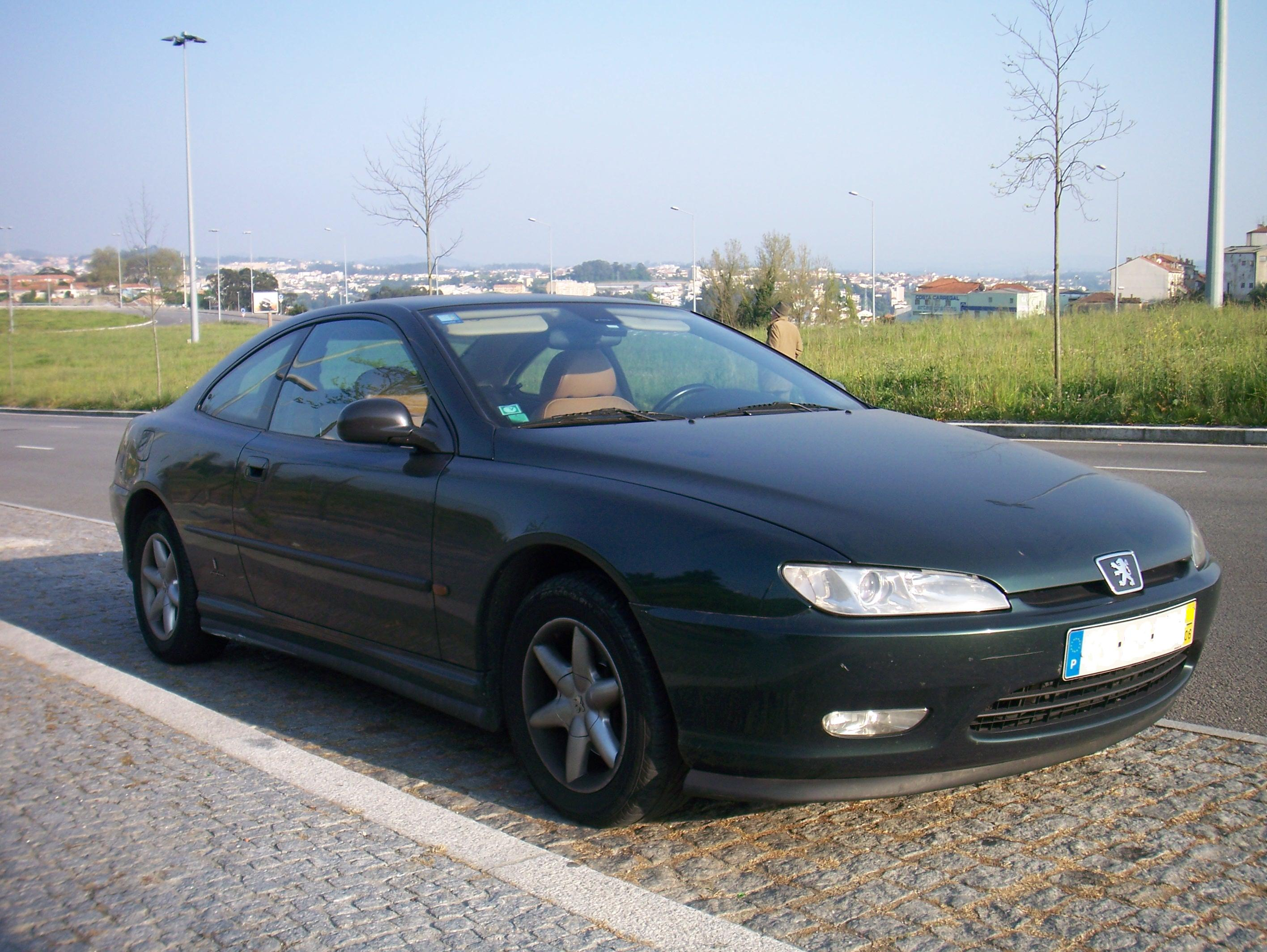 Peugeout 406 Coupé